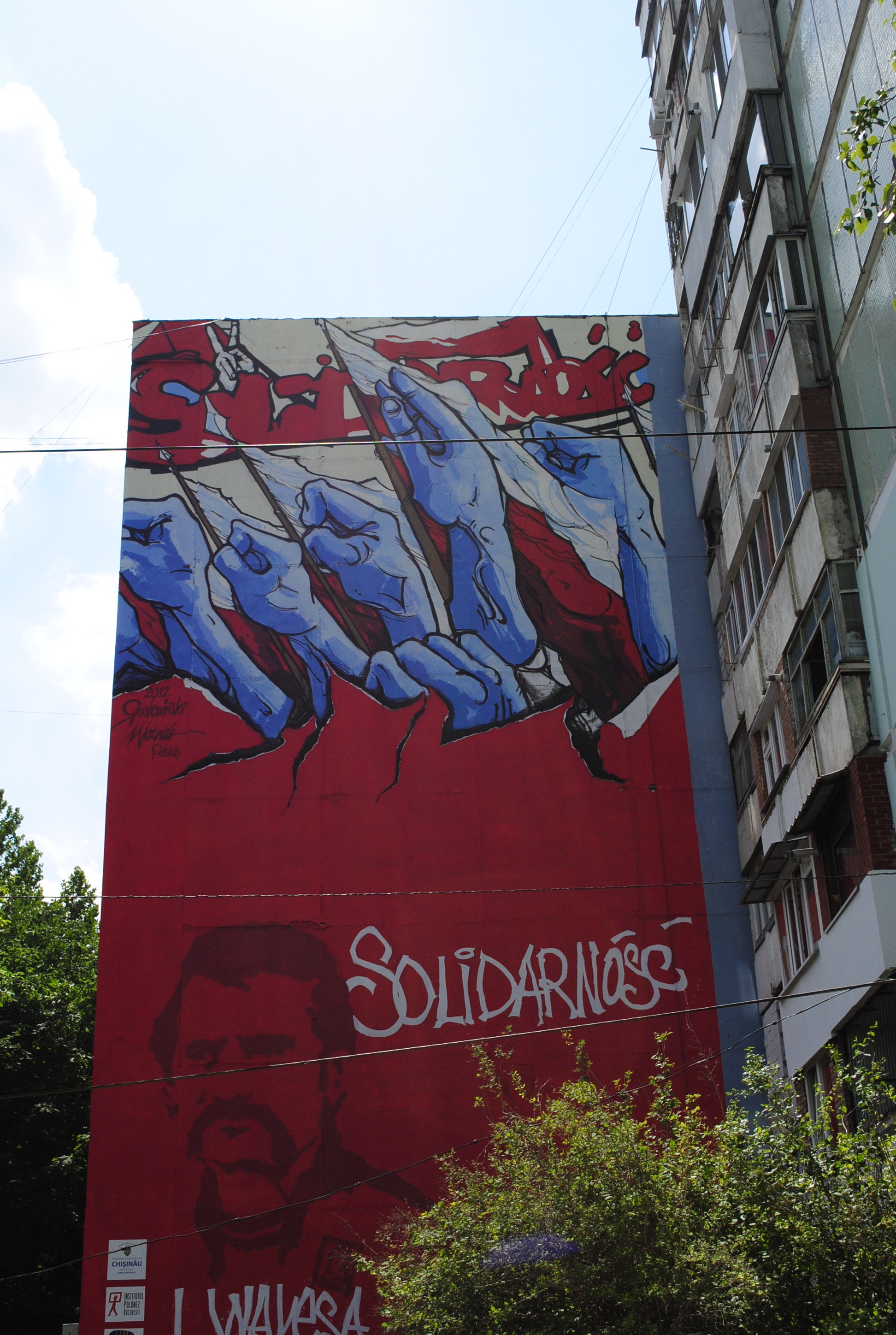 Rafał Roskowiński - materiały ze zbiorów autora.